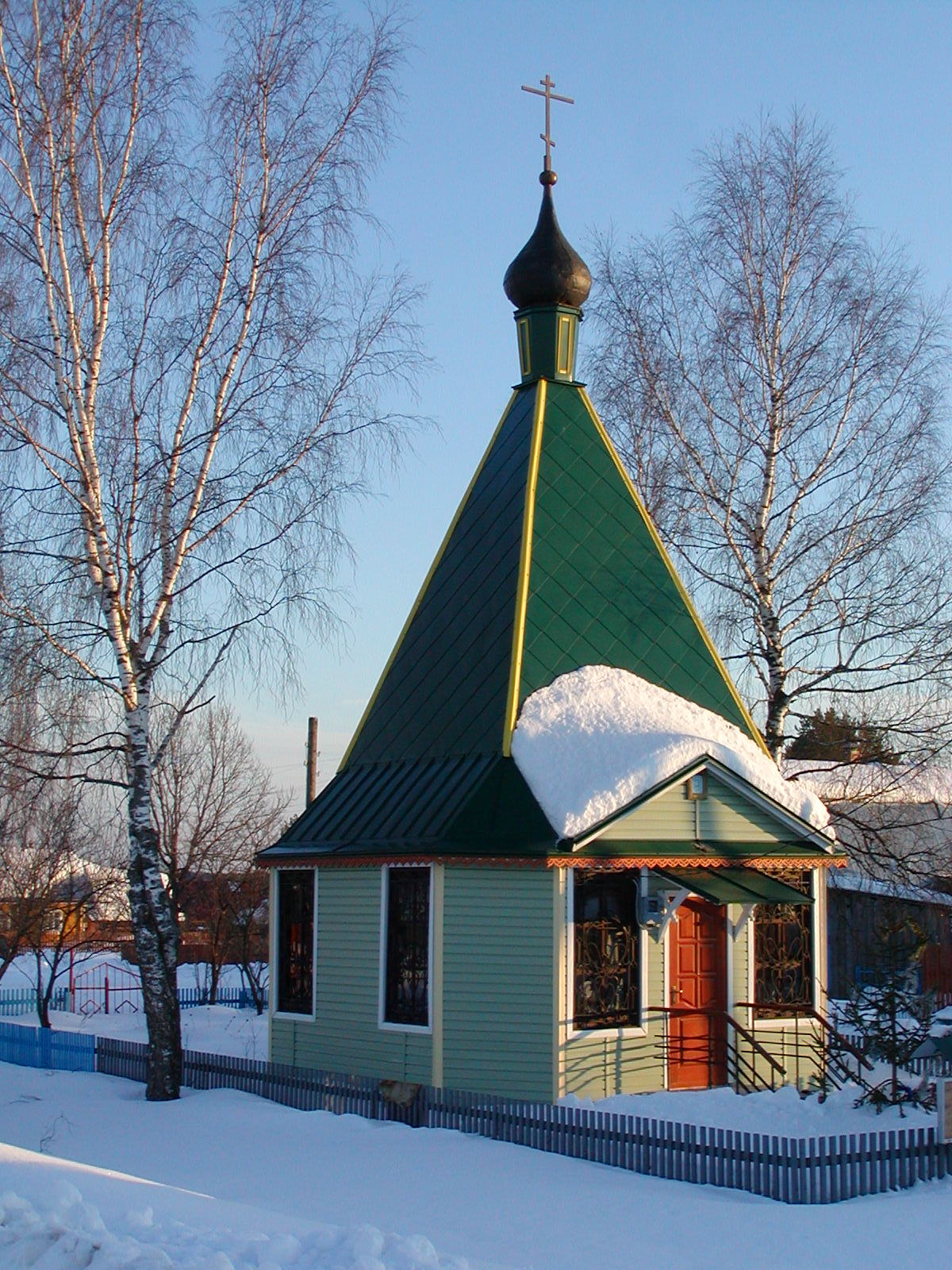 Часовня Троицы Живоначальной в деревне Зеленцино Александровского района Владимирской области